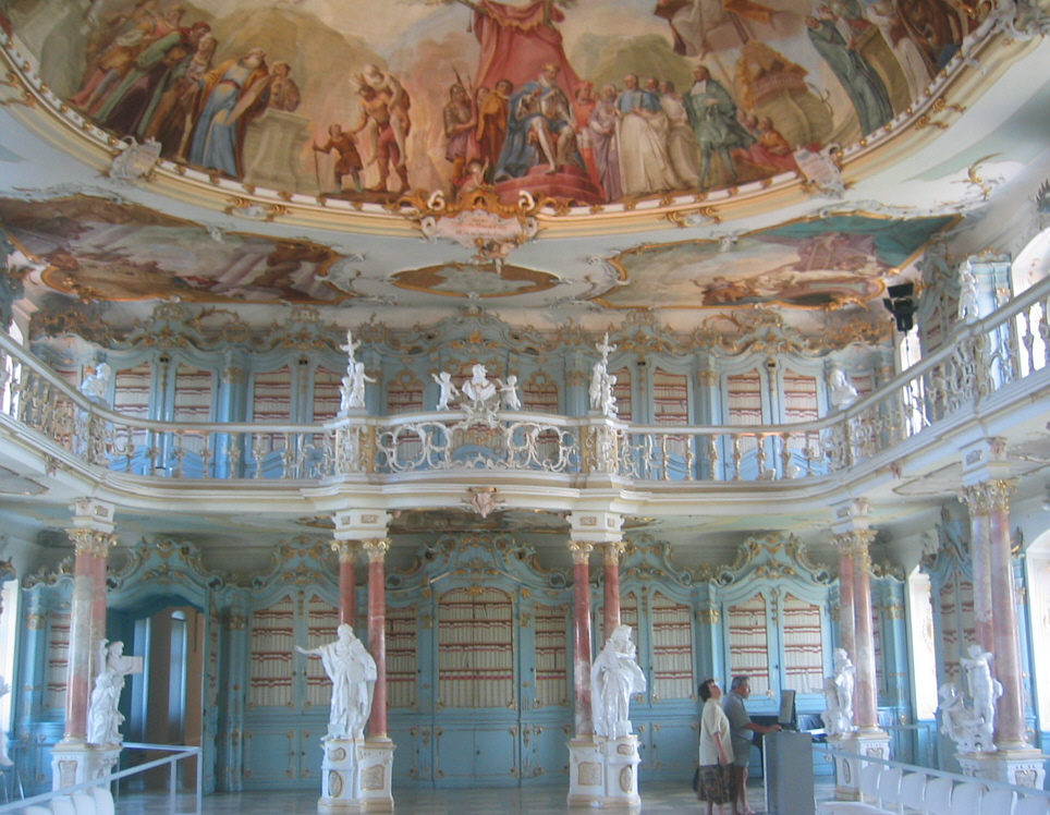 Bad Schussenried, Kloster Schussenried, Bibiothekssaal